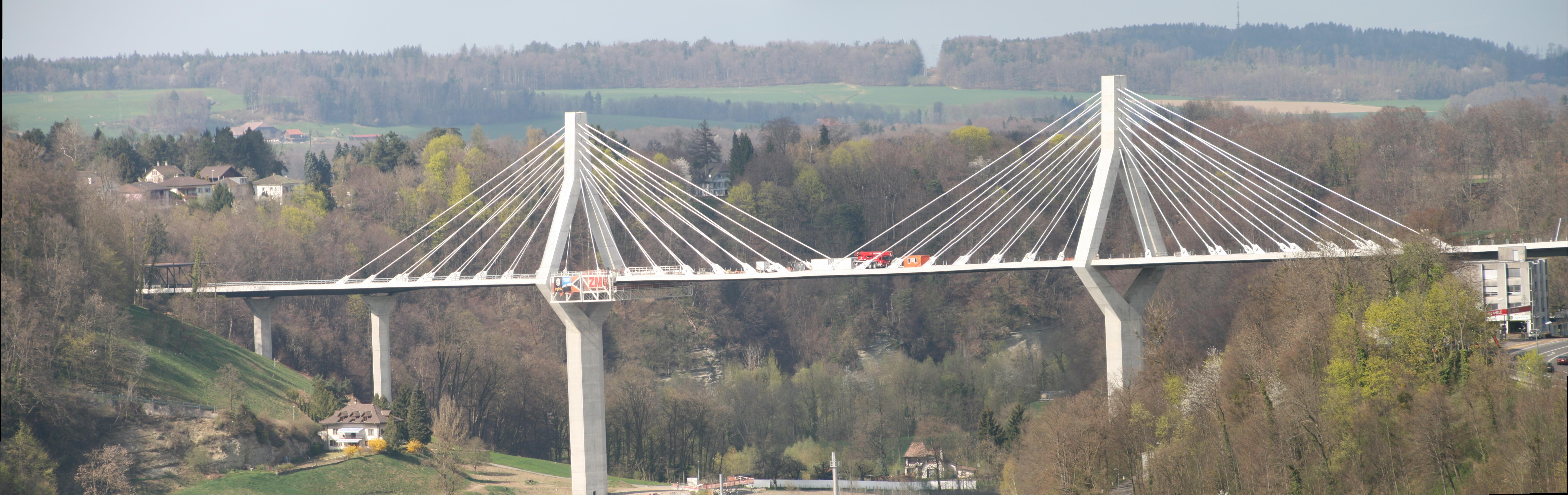 Poyabrücke Freiburg im Üechtland